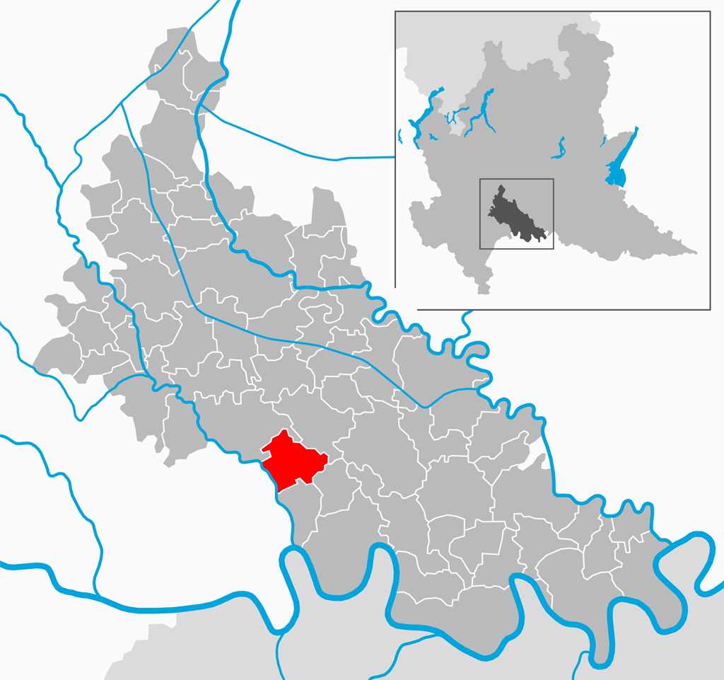 Il comune di Livraga nella provincia di Lodi